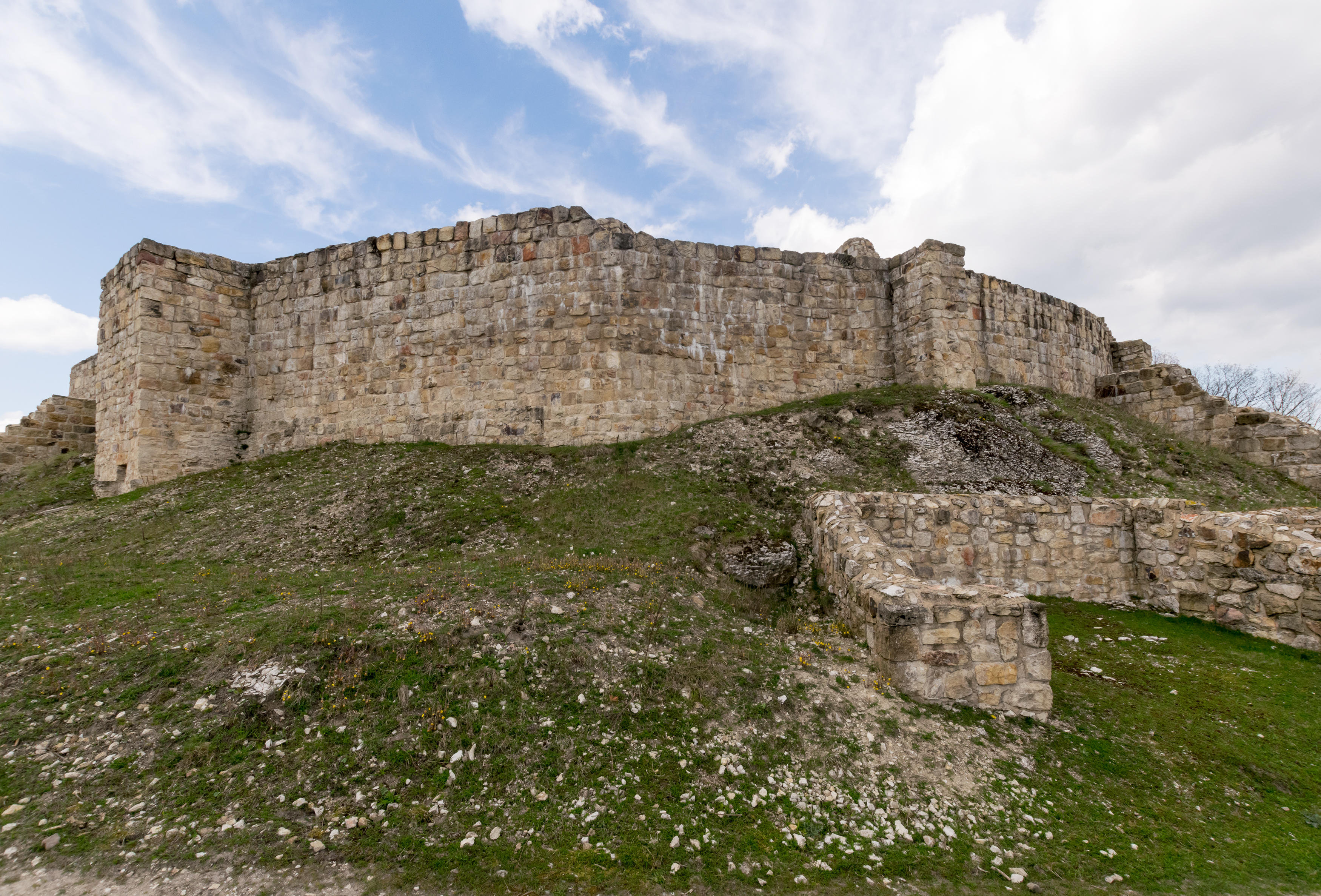 Burgruine Falkenburg in Detmold-Berlebeck im April 2016